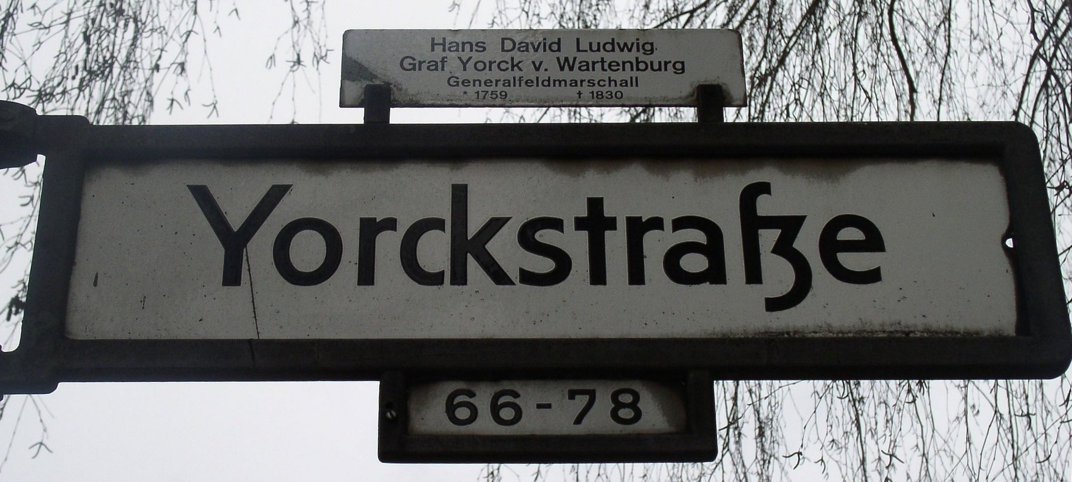 Yorckstraße in Berlin-Kreuzberg